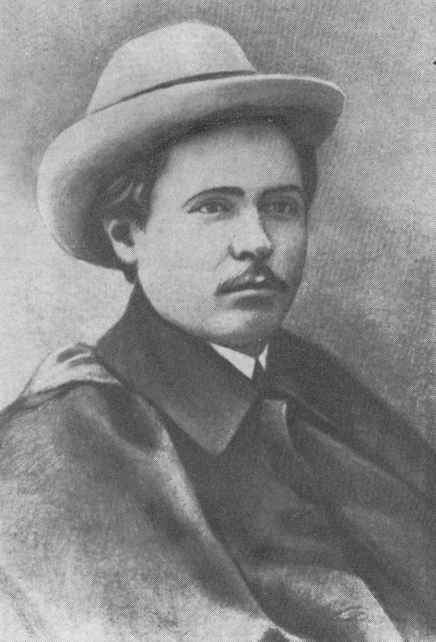 Фотография татарского писателя Галимджана Гирфановича Ибрагимова